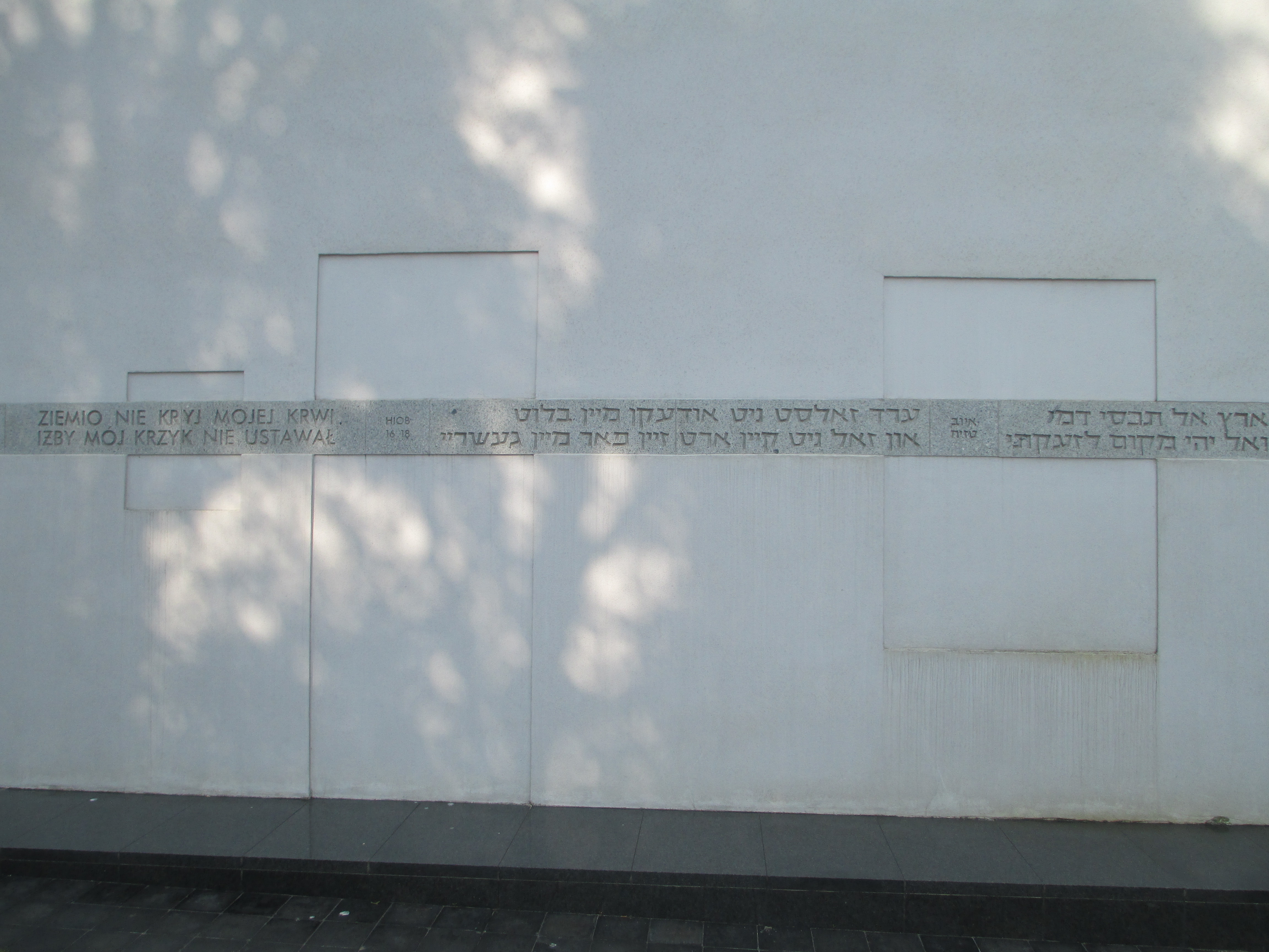 פסוק מספר איוב באומשלגפלאץ בוורשה